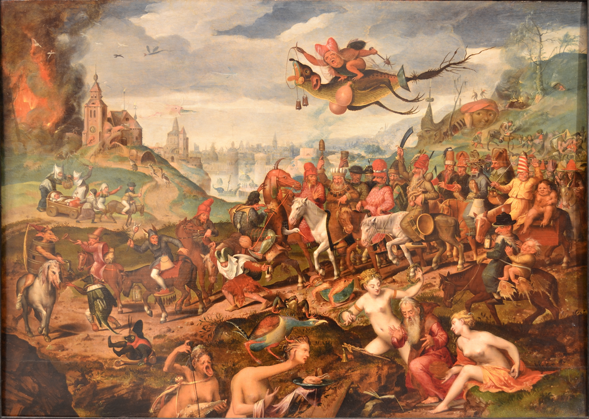 Peinture du début du XVIe siècle exposée au Palazzo Spinola di San Luca, à Gênes